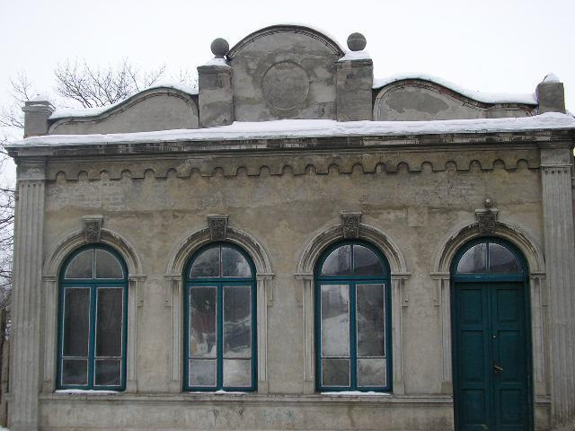 Bożnica przy ulicy Garbarskiej, na Pradze w Szydłowcu